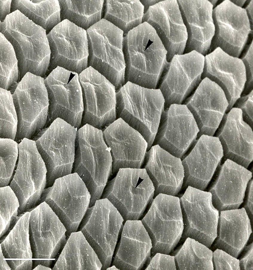 Teilbereich einer Haftscheibe (hier:Hyla cinerea) Unter dem Rasterelektronenmikroskop (REM) erweisen sich die Oberflächen der Haftscheiben von Laubfröschen als ein komplexer Zusammenschluss zahlreicher kleiner Untereinheiten, die vom optischen Eindruck an ein Bienen-wabenartiges Muster erinnern. Bemerkenswert sind die trichterförmigen Einbuchtungen (Pfeilköpfe) Vergr.: ca. 2.400 x